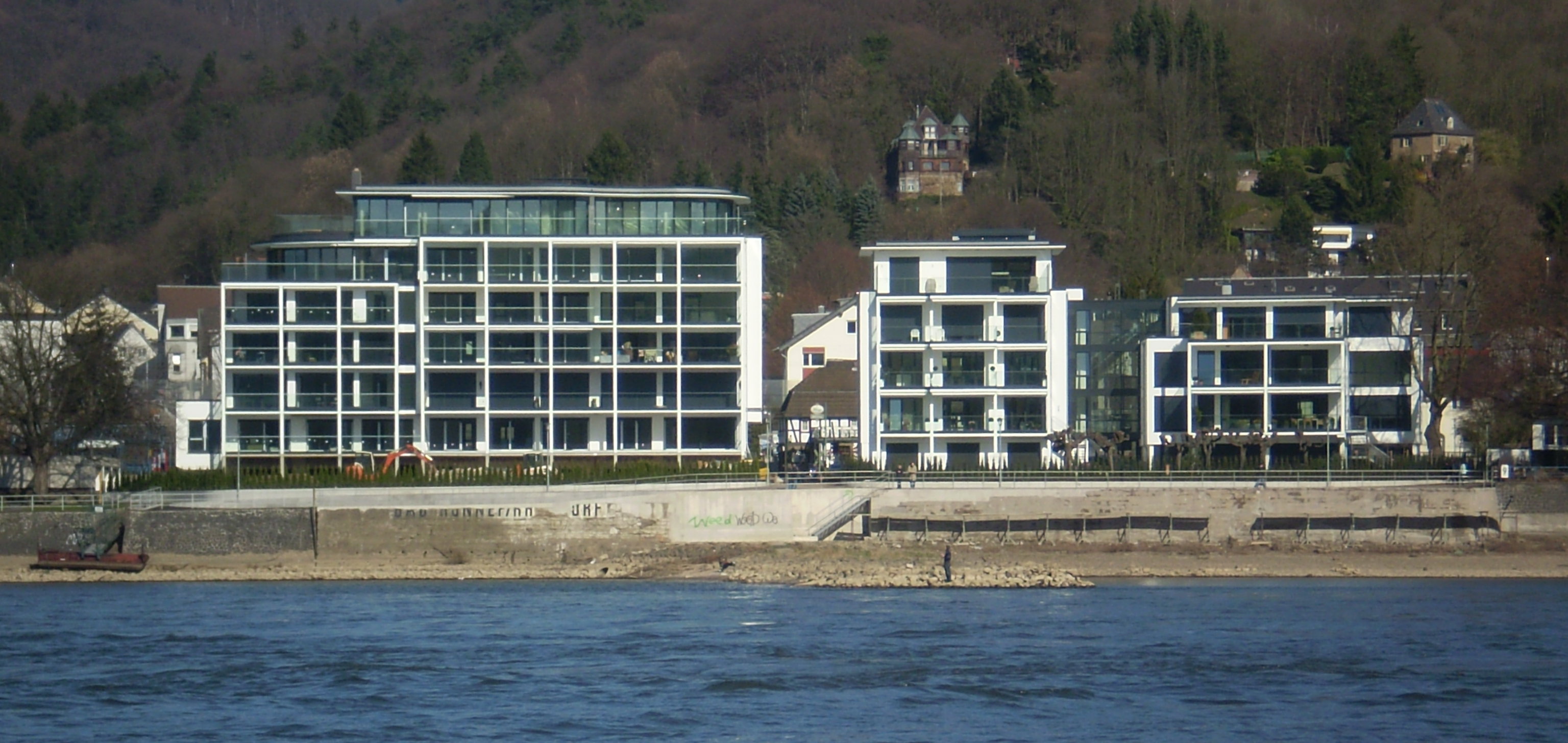 Umgebautes ehemaliges Hotel Bellevue in Rhöndorf, Bad Honnef